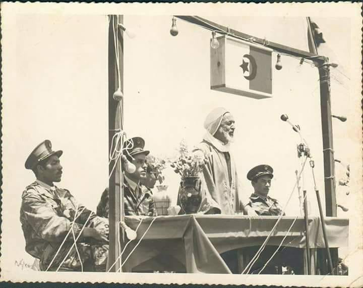 مؤتمر واحتفال بعيد النصر 19 مارس في منطقة الشارف بالجزائر